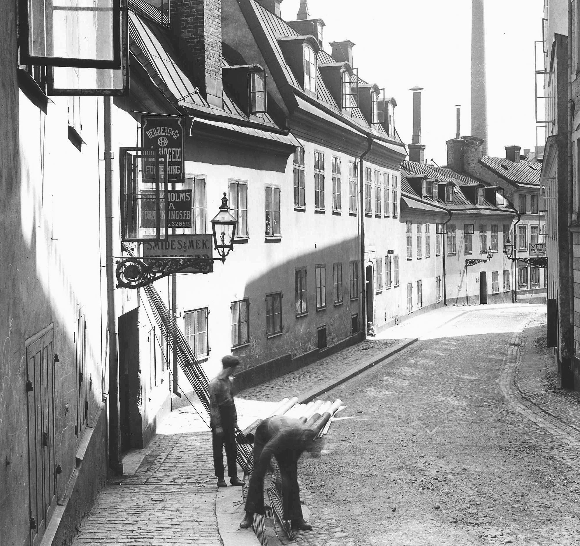 Pryssgränd österut